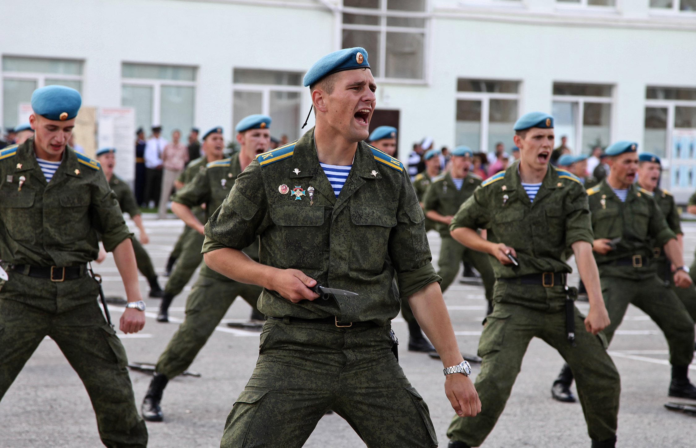 Демонстрационная программа завершилась еще одним выступлением с приемами рукопашного боя (One more pokazukha)